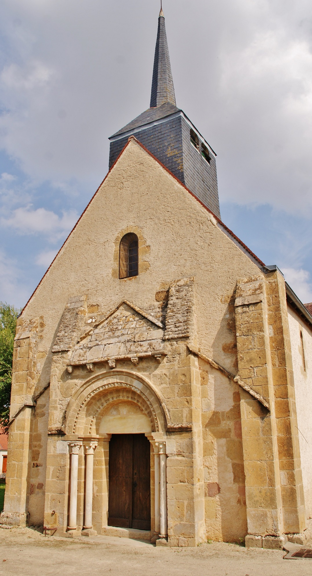 Église Notre-Dame de Garigny (18).